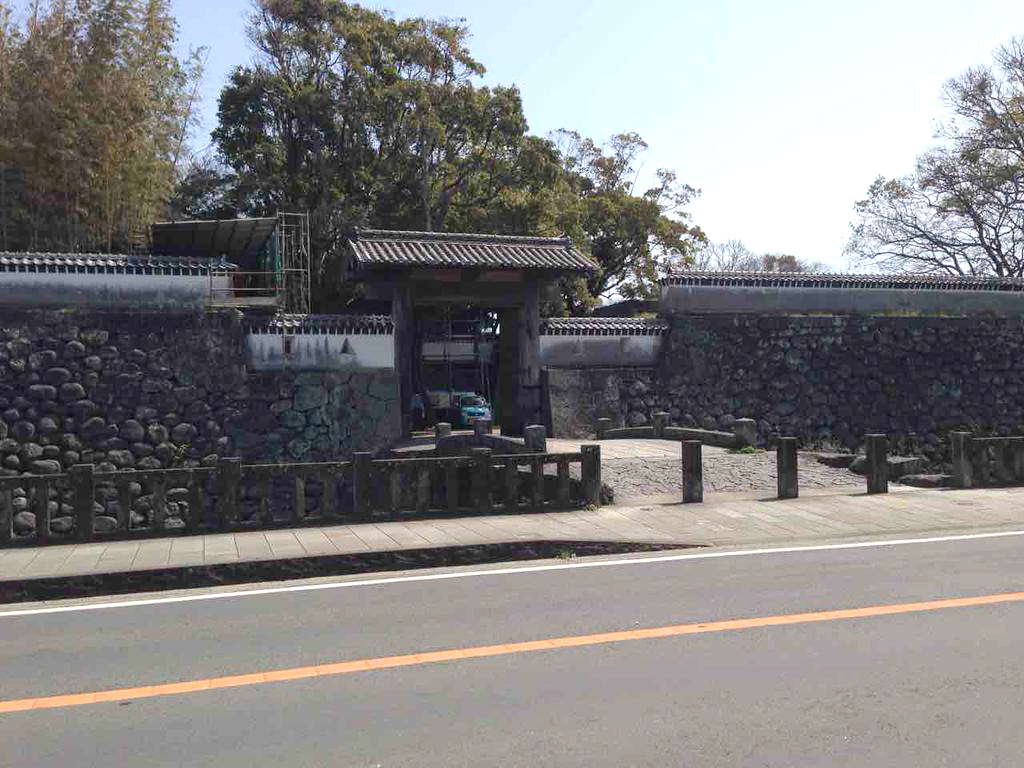 長崎県五島市-石田城：大手門（正面遠景）